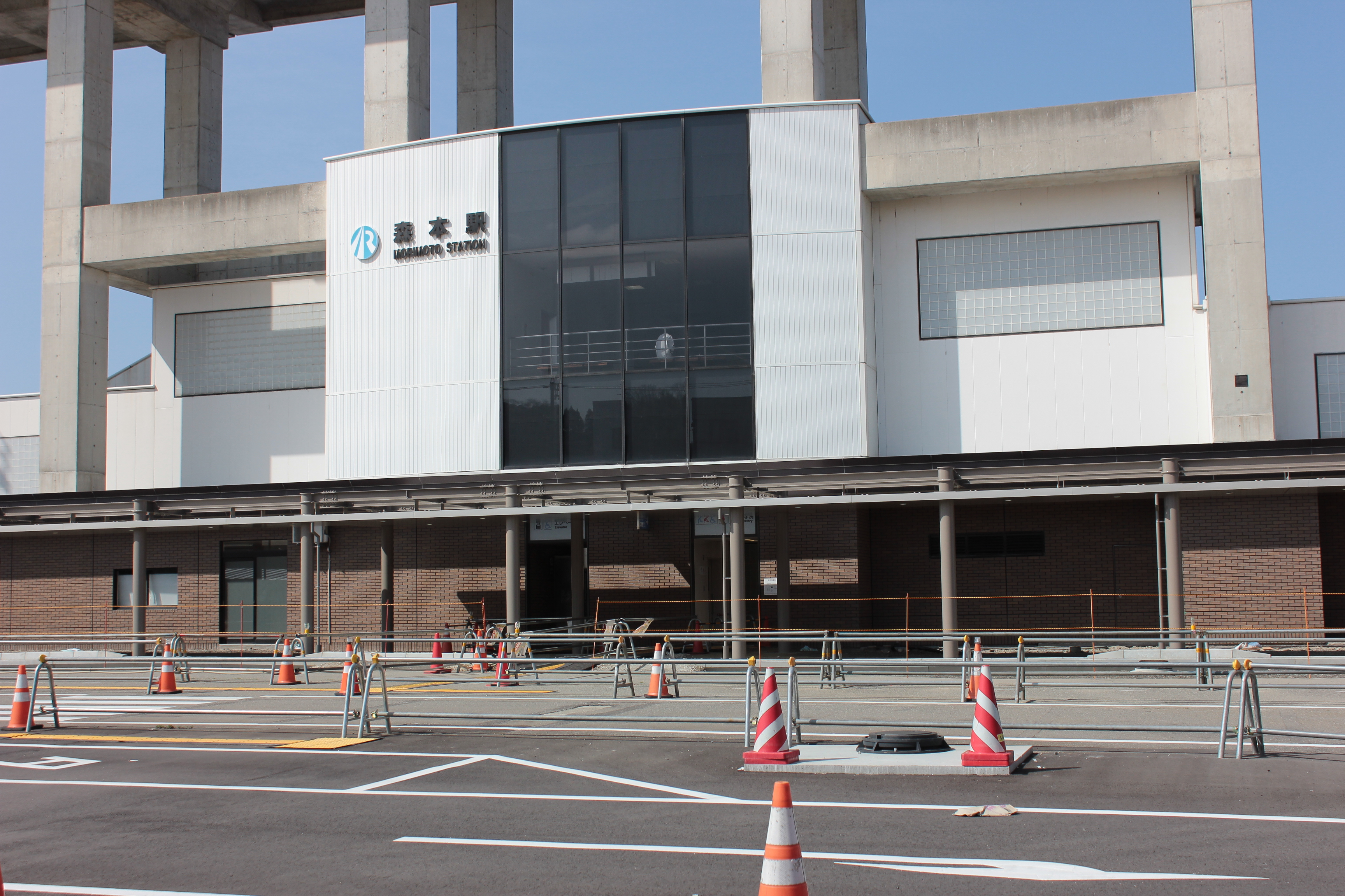 森本駅（石川県金沢市） Canon EOS Kiss X5